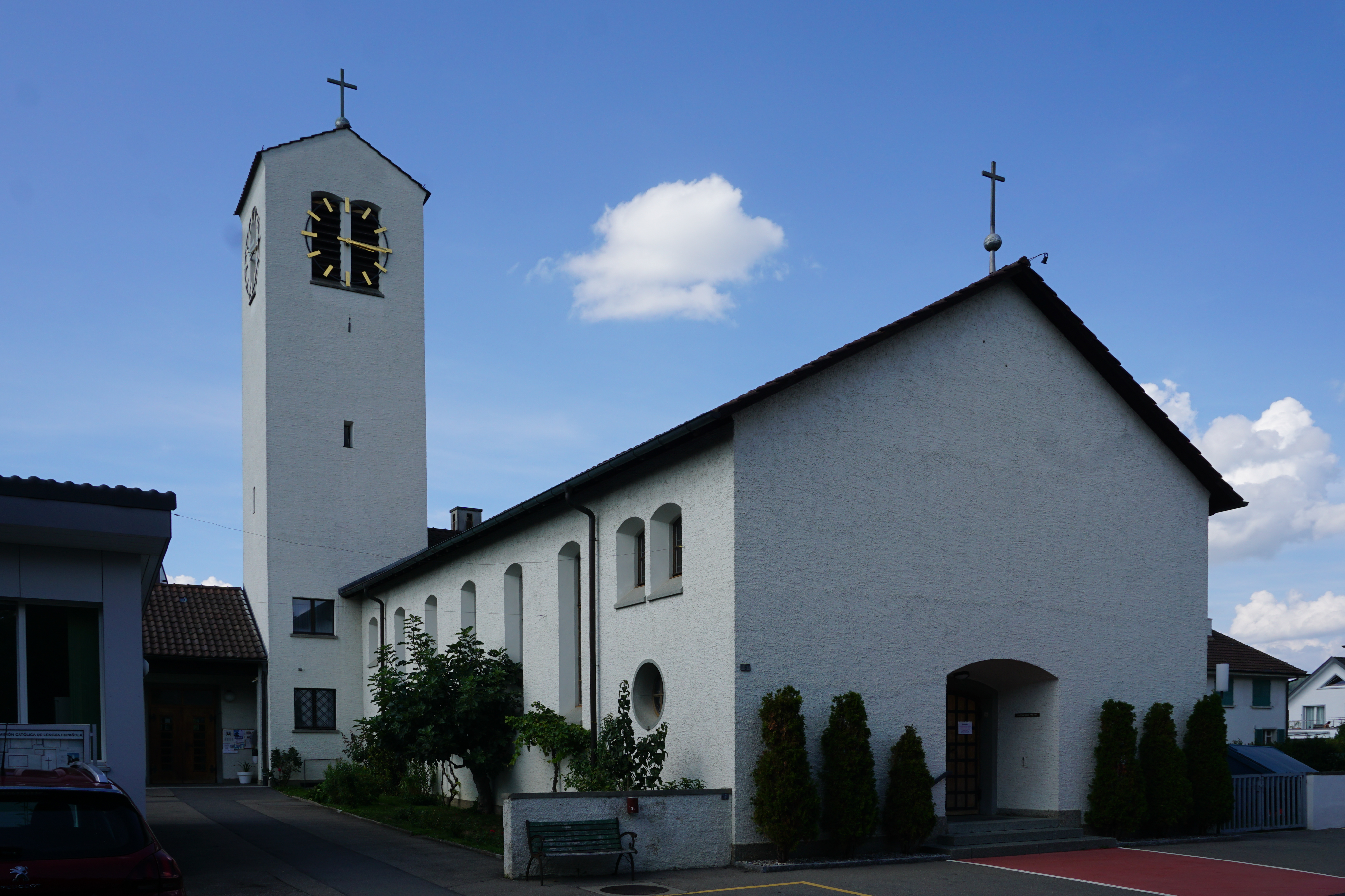 Die erste Guthirt-Kirche in Ostermundigen. Jetzt Kirche der Spaniermission.